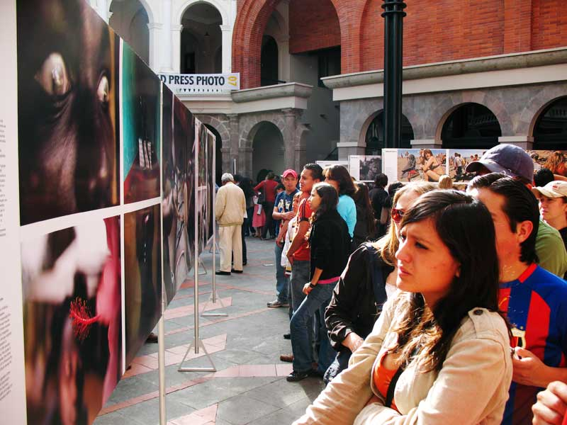 El público y el montaje de la edición 2008 del World Press Photo en Quito.